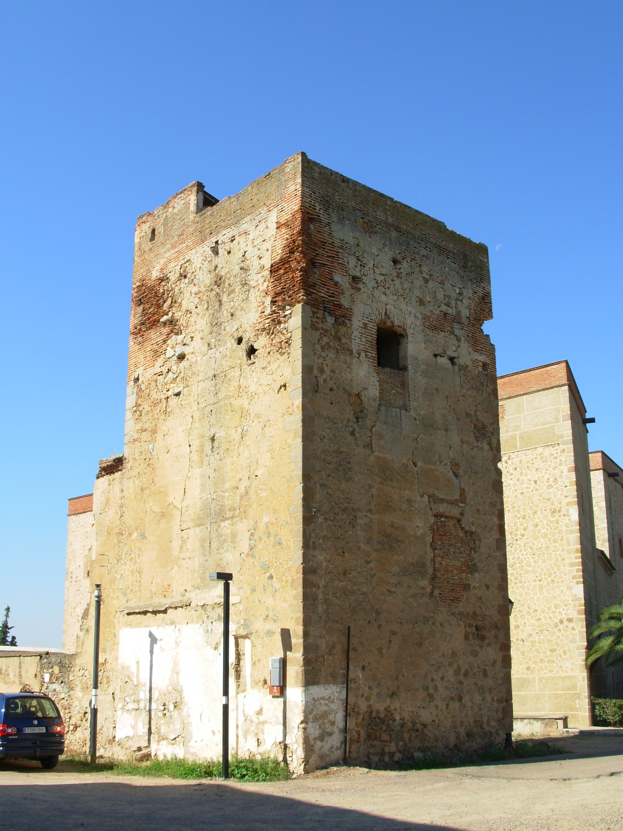 Torre del Obispado en la Alcazaba de Badajoz